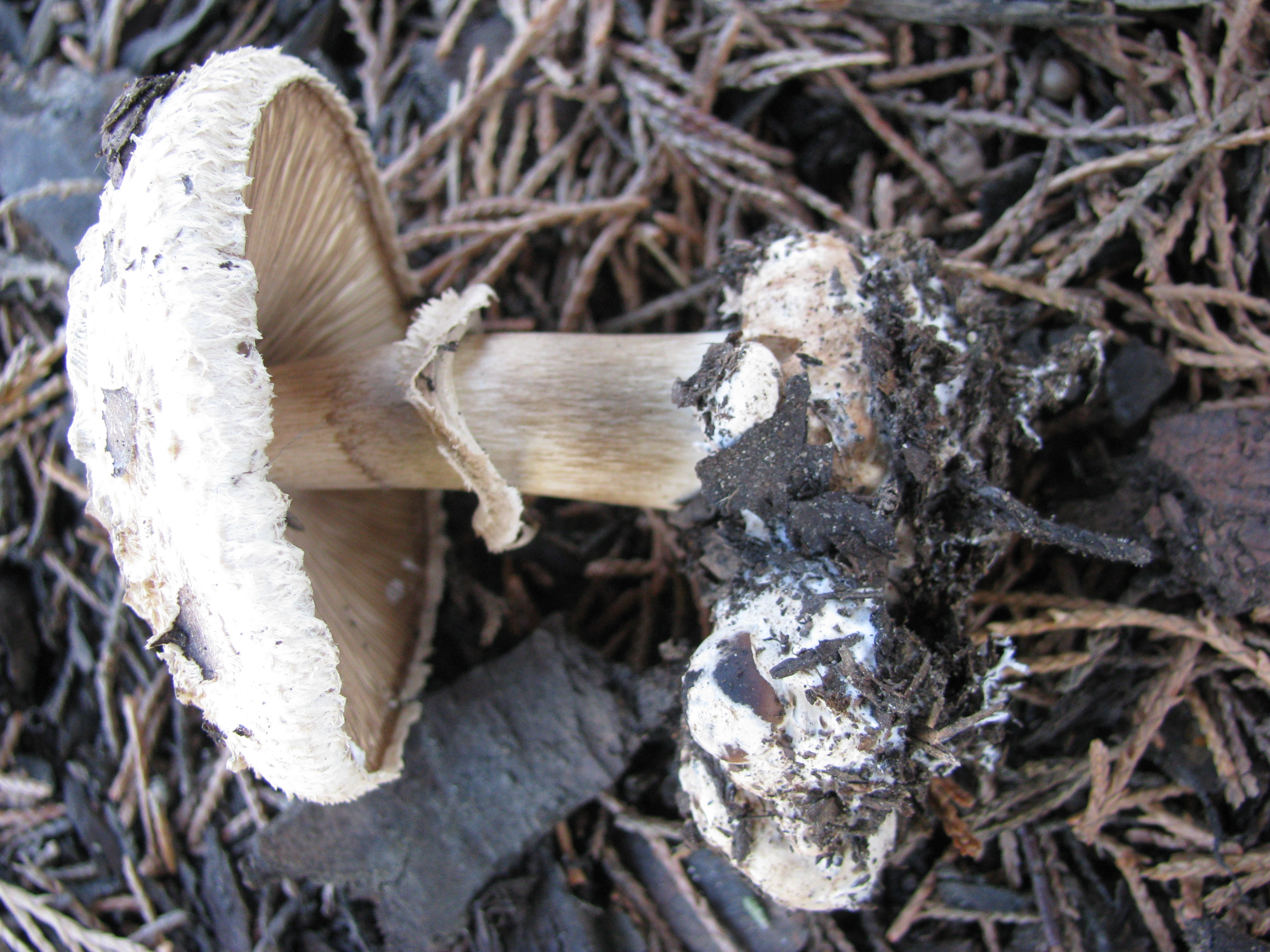 Chlorophyllum brunneum, Garten-Safranschirmling oder Großknolliger Safranschirmling, gefunden in Ingelheim am Rhein, Deutschland